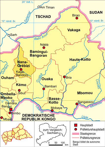 politische Karte der Zentralafrikanischen Republik (Präfektur Nana-Grébizi hervorgehoben)